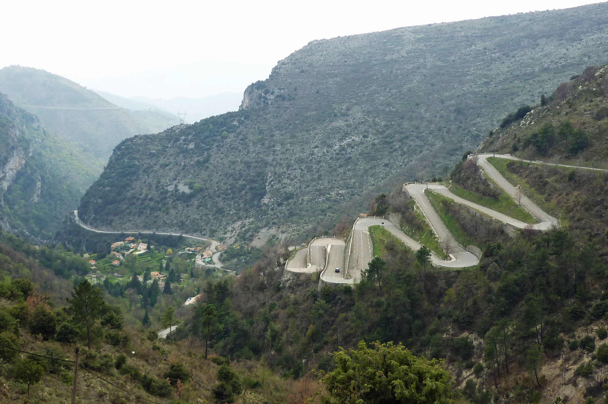 Straße unterhalb des Passes Col de Braus in Richtung Nizza